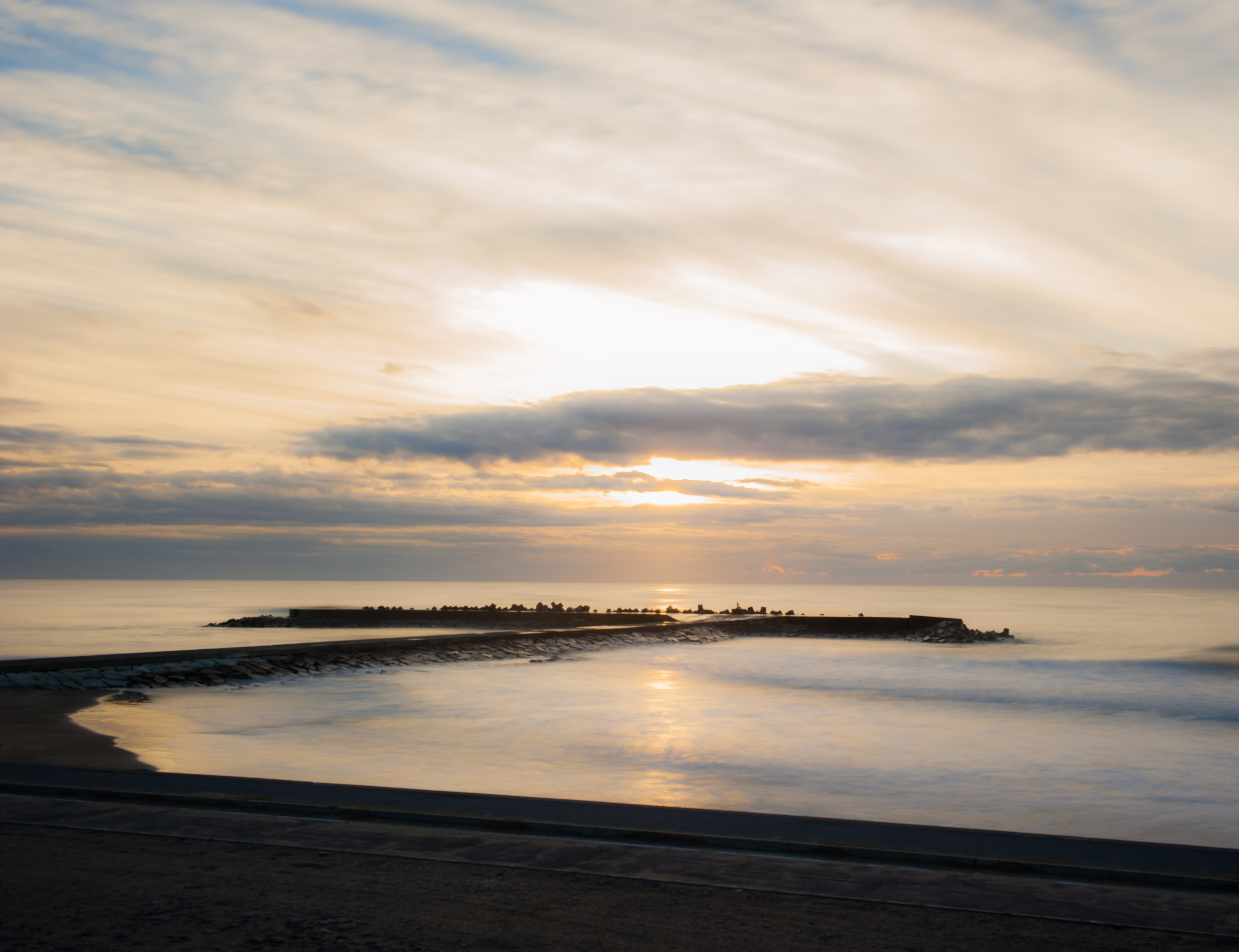 2013.1.01吉崎